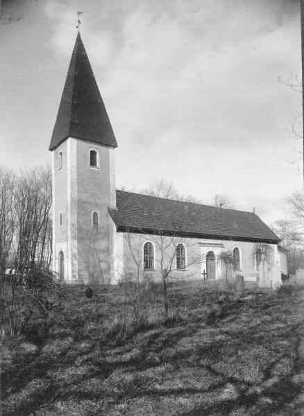 Kyrkan från sydväst.